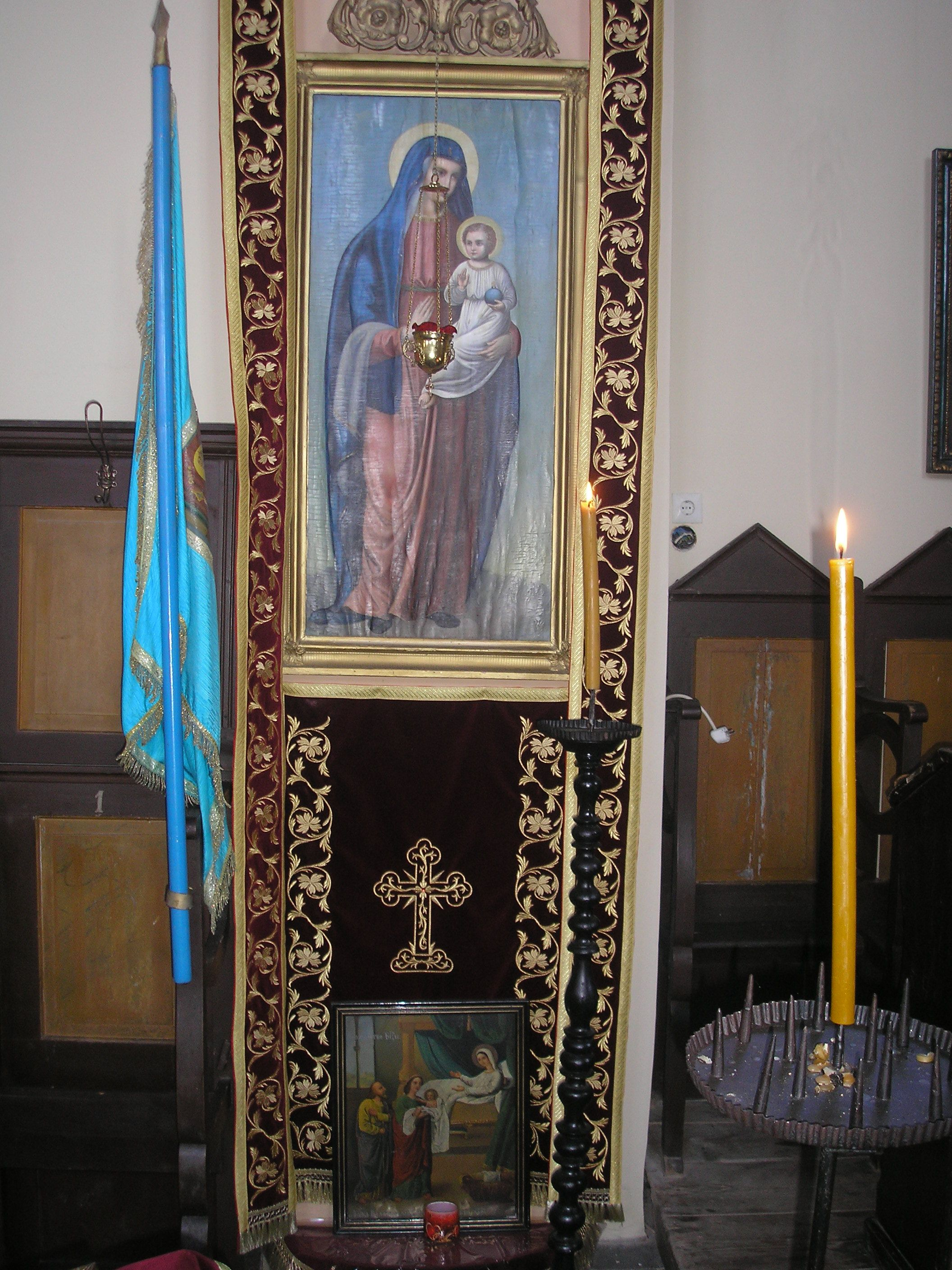 Szűz Mária trónusa (Szerb ortodox templom, Szeged-Szőreg, Magyarország)